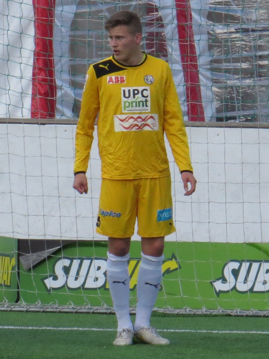 Mikko Viitikko, suomalainen jalkapalloilija Vaasan Palloseuran joukkueessa kaudella 2015.